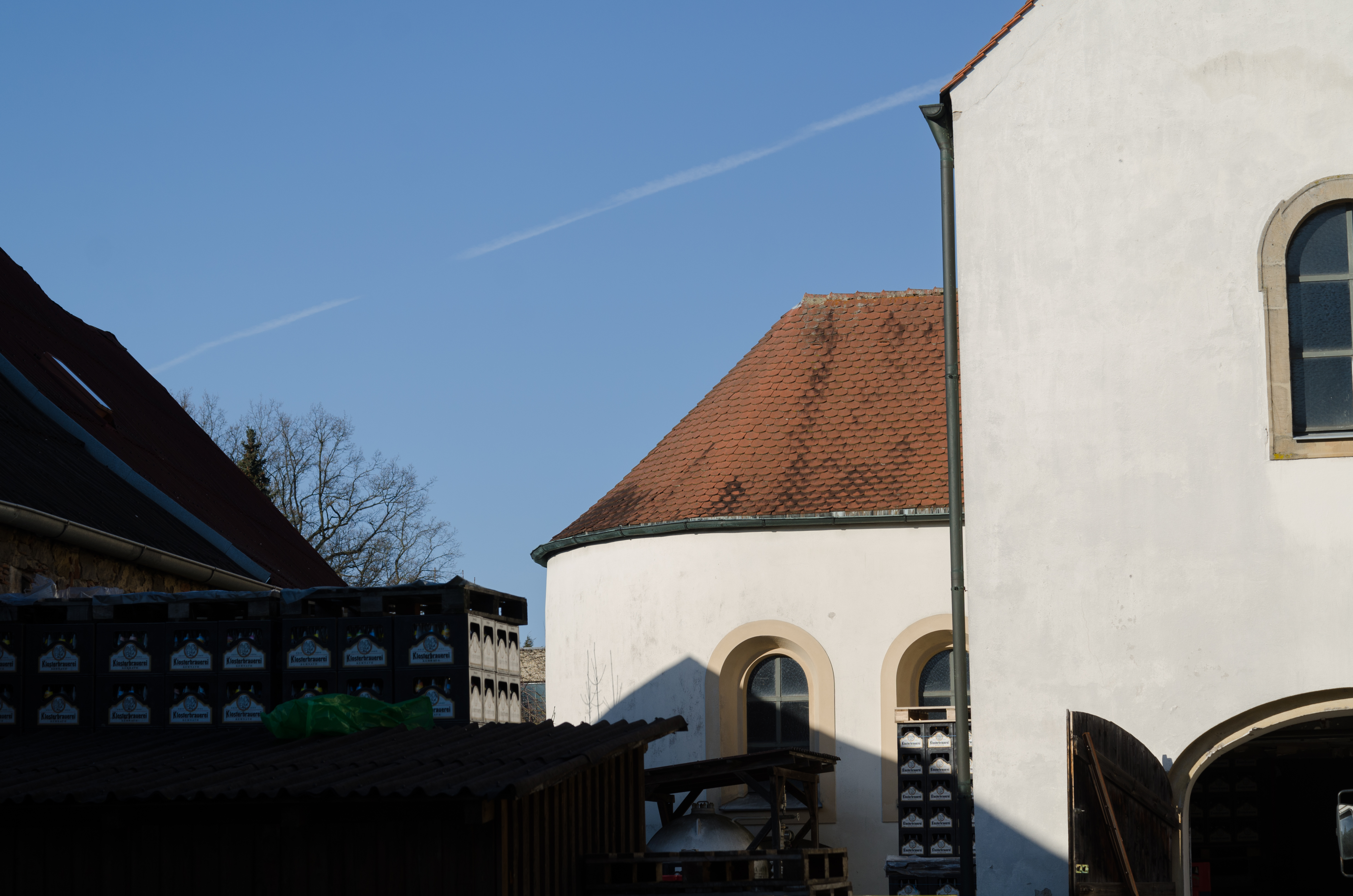 Kemnath, Klosterhofstraße 1